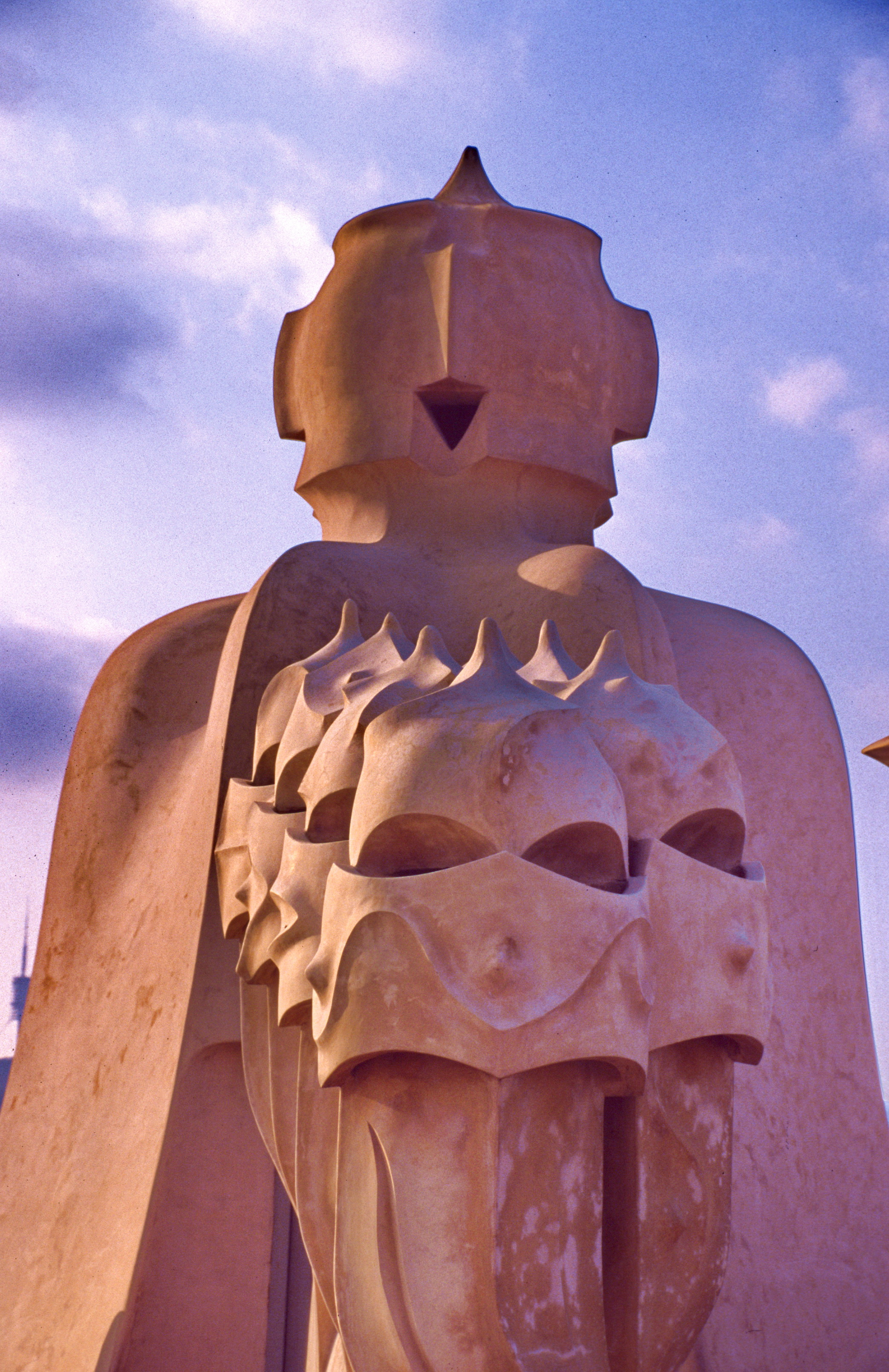 Casa Milà. Xemeneies i badalots o sortides d'escala